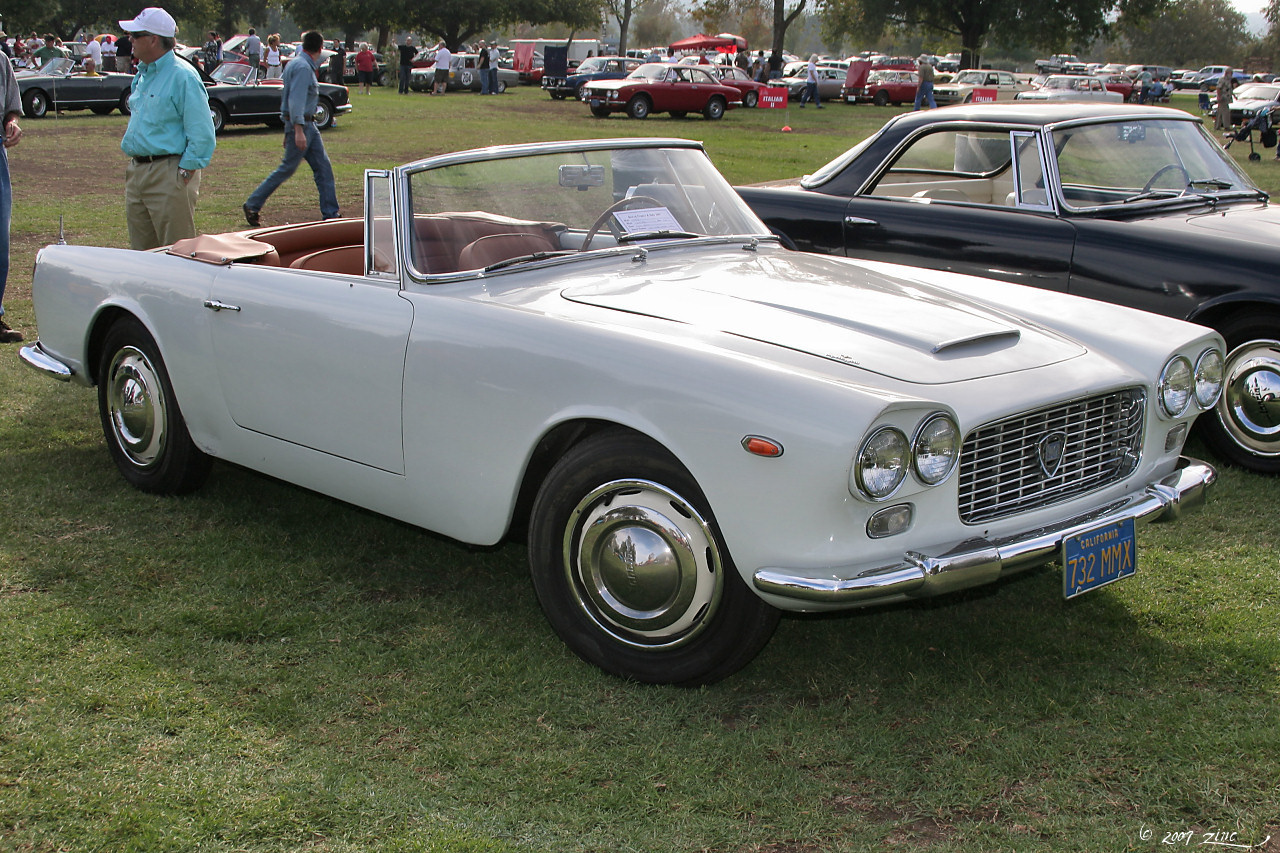 1961 Lancia Flaminia Convertible - fvr-1